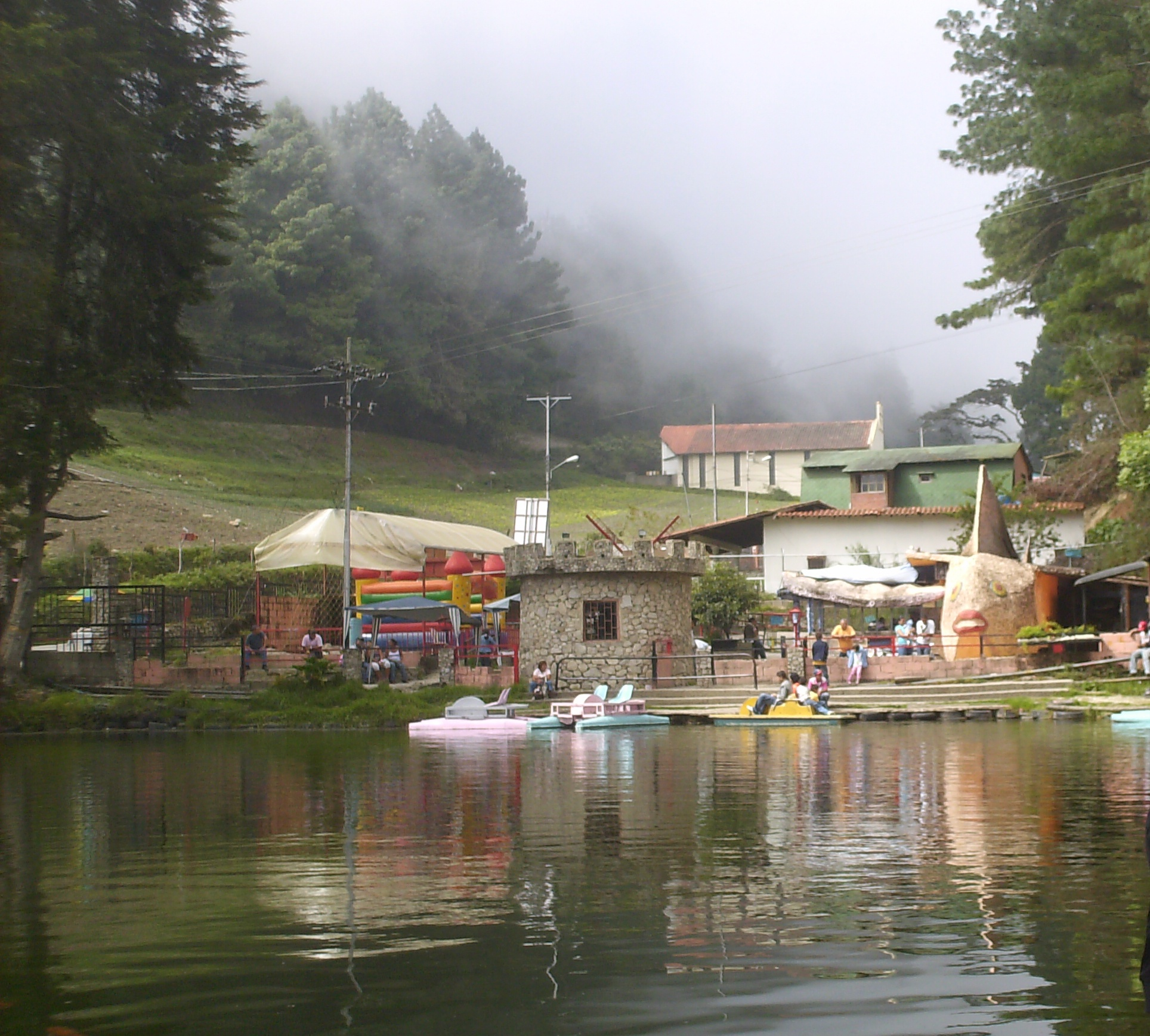 Pequeña laguna a orillas de La Puerta (Trujillo), Venezuela.